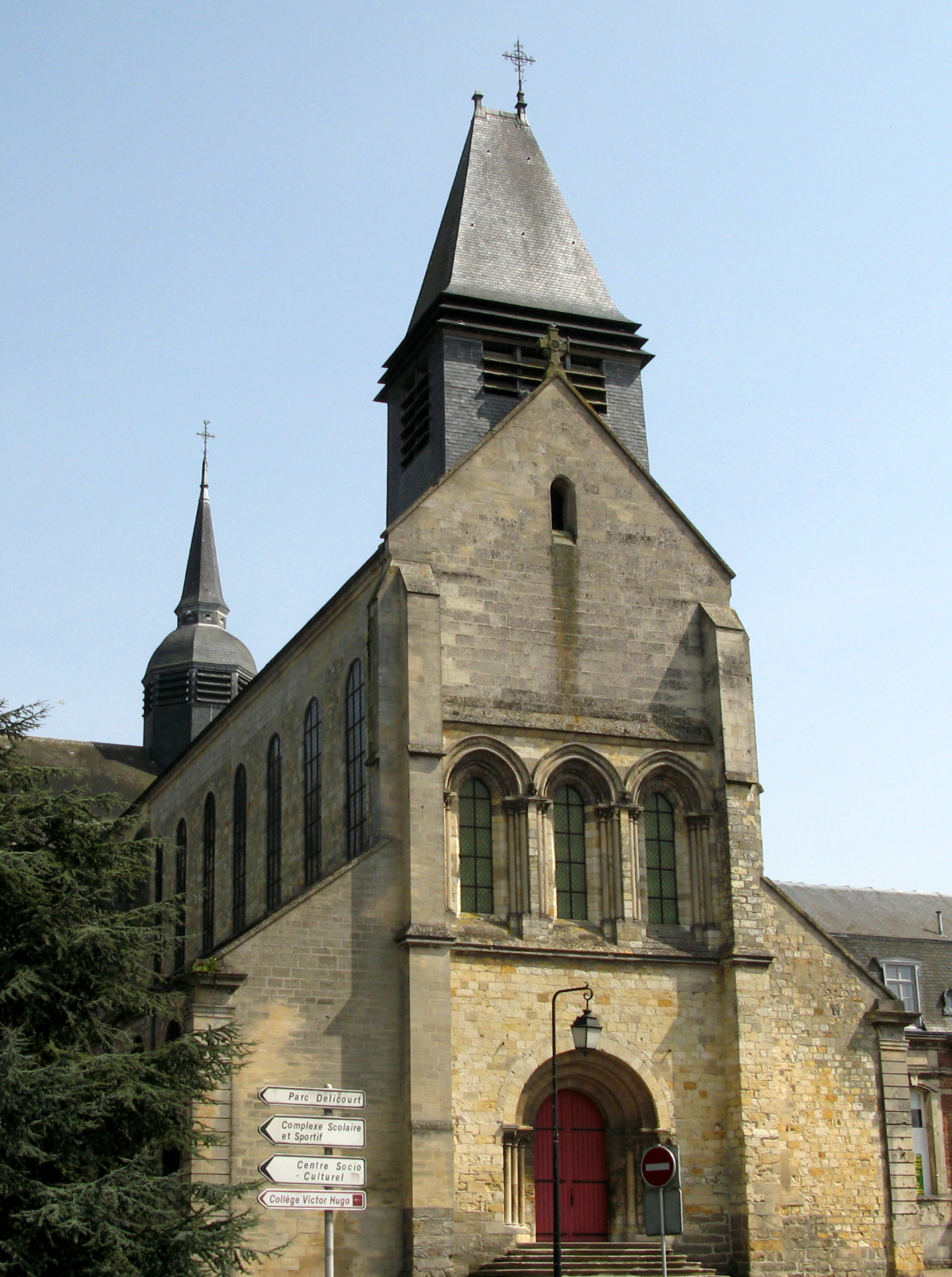 Ham (Somme, France) - L'église Notre-Dame. .